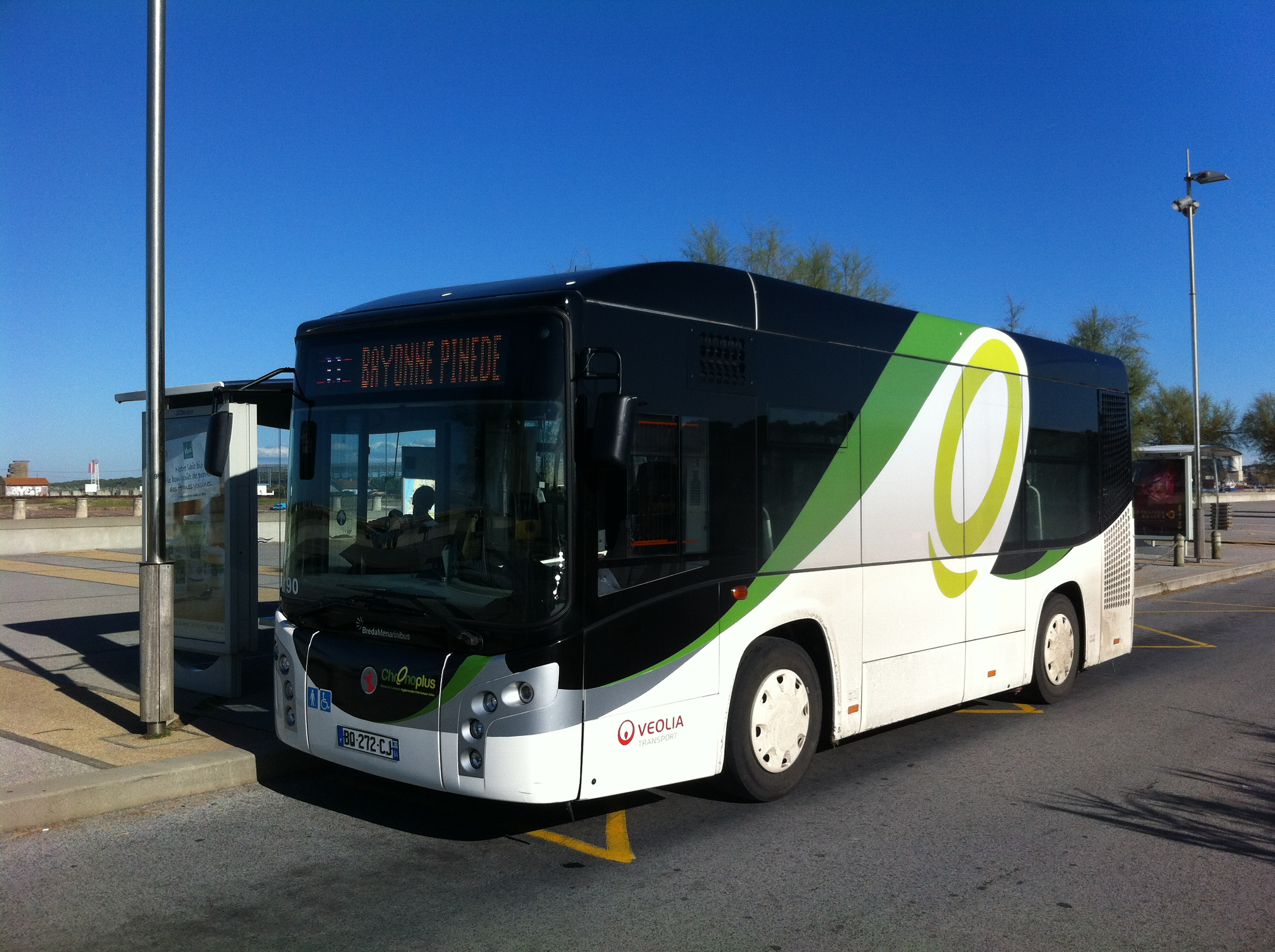 BredaMenarinibus Vivacity II sur la ligne 11 à l'arrêt Anglet La Barre sur le réseau Chronoplus.